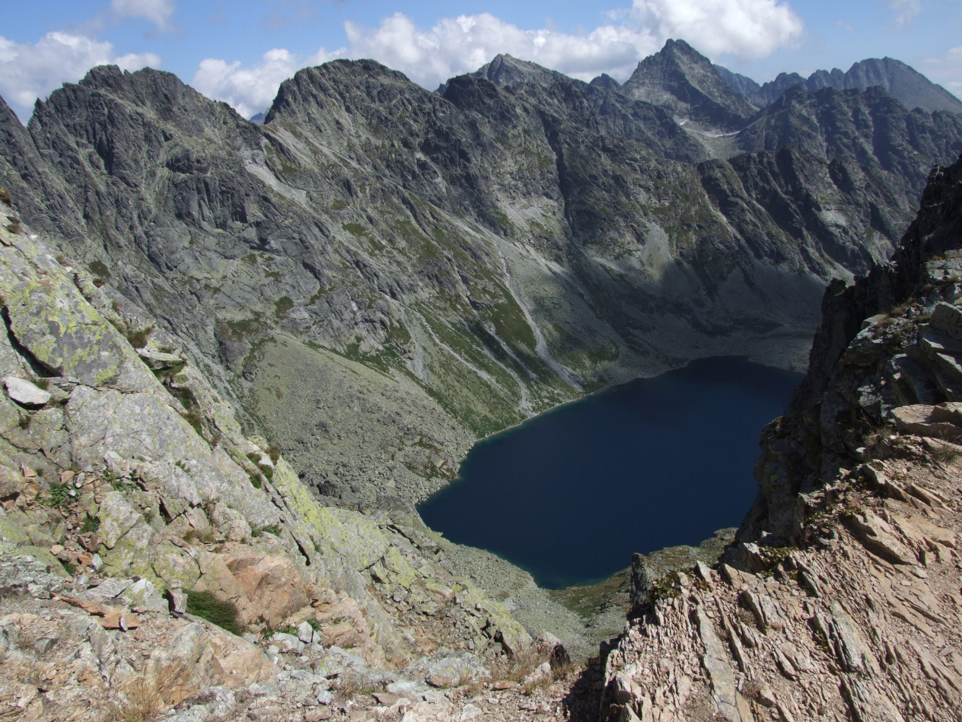 Wielki Hińczowy Staw, widok z Koprowego Wierchu. Ponad nim od lewej: Pośredni i Czarny Mięguszowiecki Szczyt i Hińczowa Turnia, z tyłu Wysoka i Gerlach